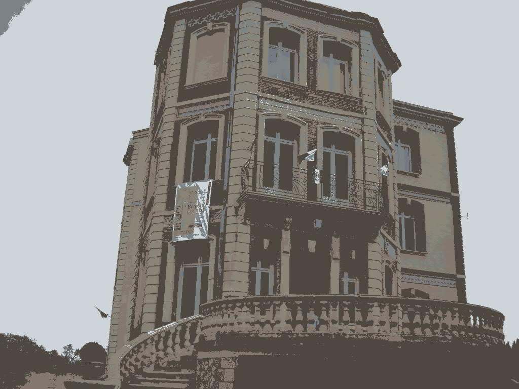 Imagen del Castillo d'En Bardou, donde se estableció la Maternité Suisse d'Elne.